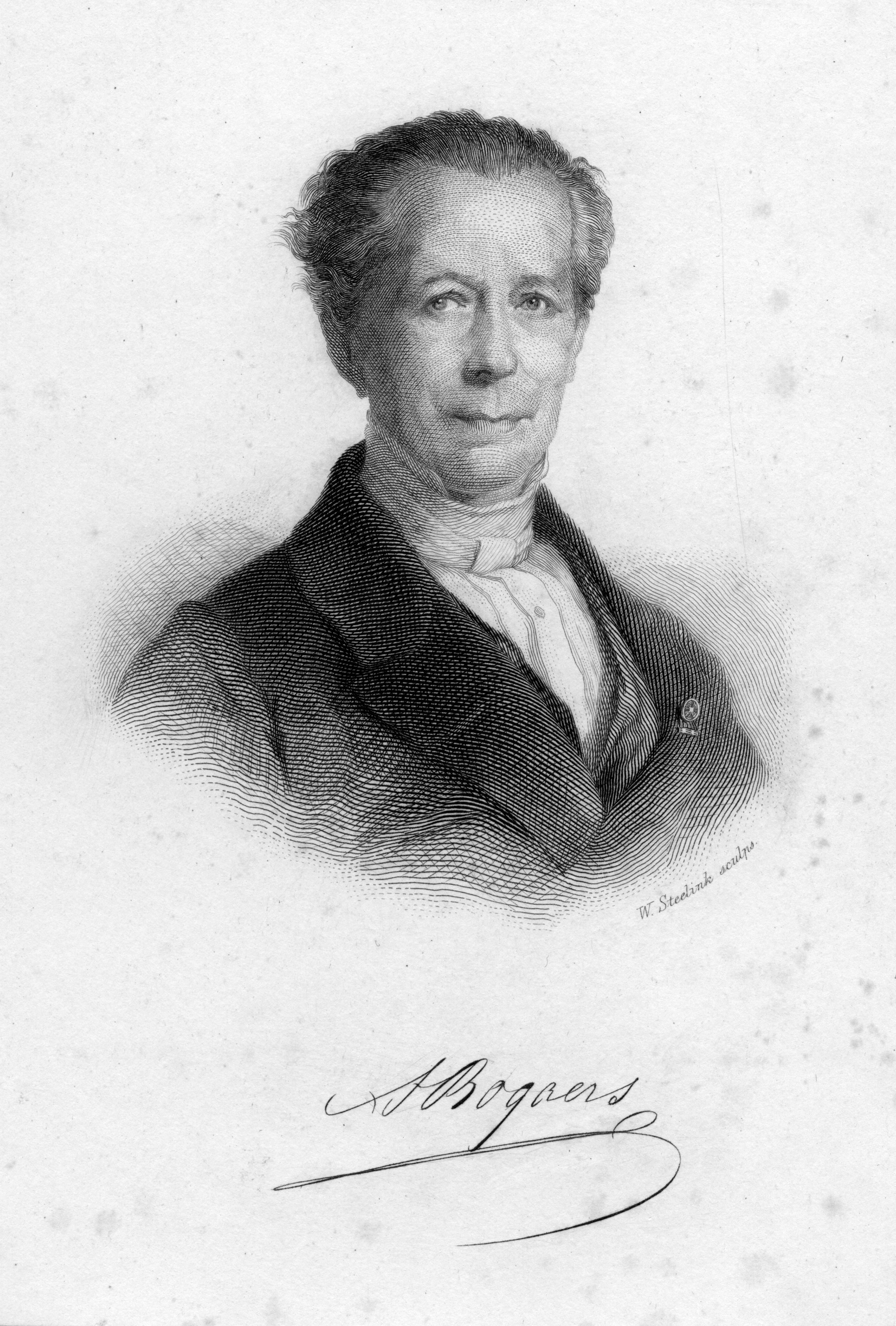 portrait gravé